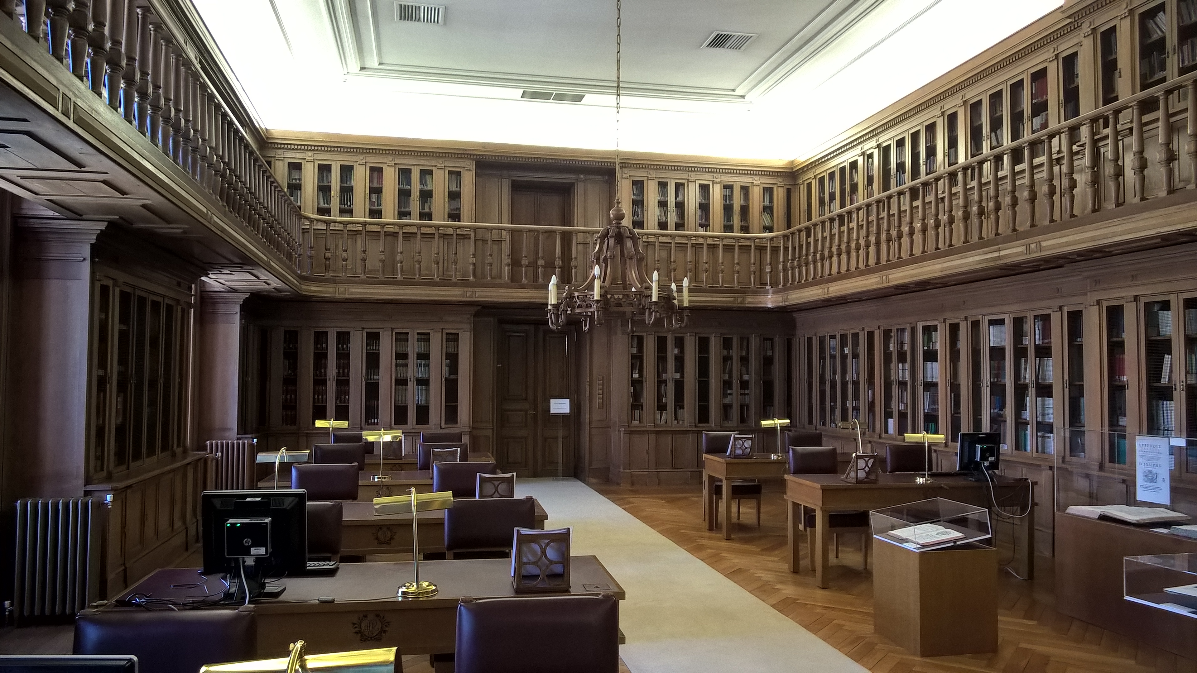 Biblioteca Passos Manuel, Palácio de São Bento